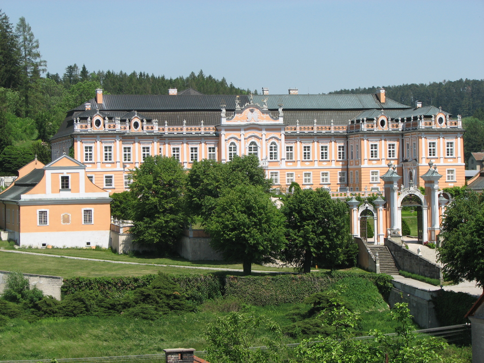 Zámek Nové Hrady, Nové Hrady 1